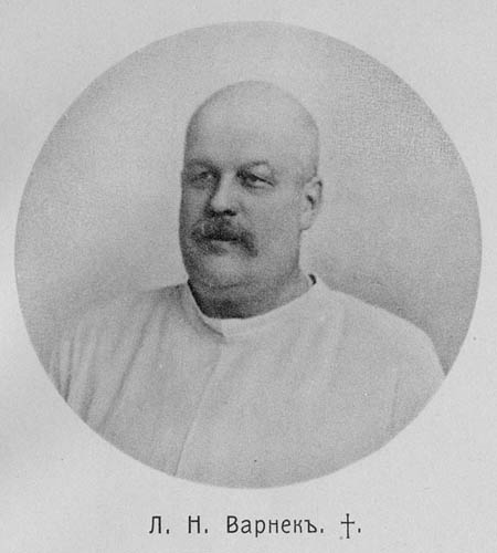 Леанід Мікалаевіч Варнек